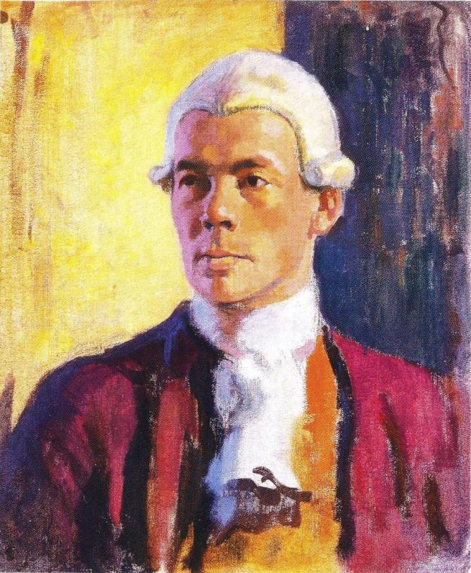 Eero Järnefeltin maalaus kirjailija Frans Emil Sillanpäästä kustavilaistyylisessä asussa ja peruukissa, harjoitelma Aurora-seura-seinämaalausta varten. Sillanpää toimi maalauksen yhden hahmon mallina. Teos kuuluu yksityiskokoelmaan.